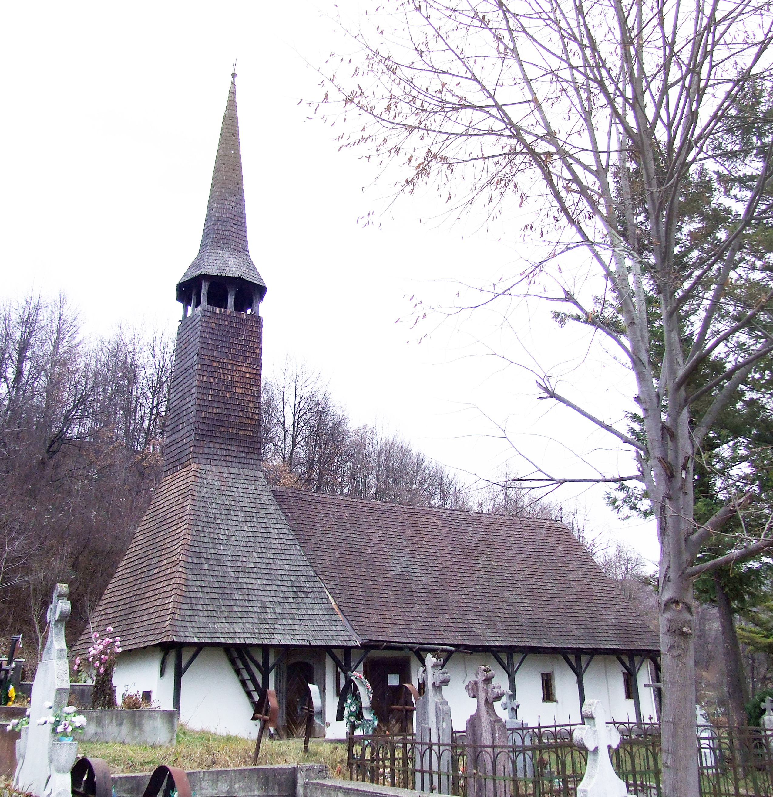 Biserica de lemn din Peştiş, judeţul Bihor.